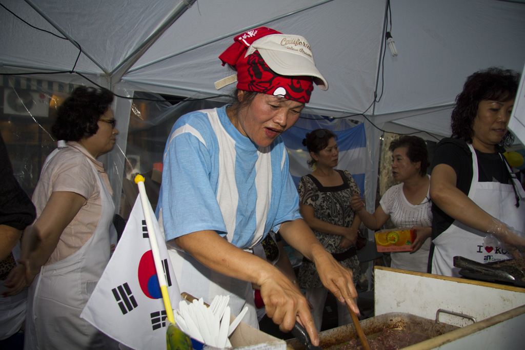 Por ejemplo, la comida oriental tuvo una fuerte presencia. ( Foto: Estrella Herrera)